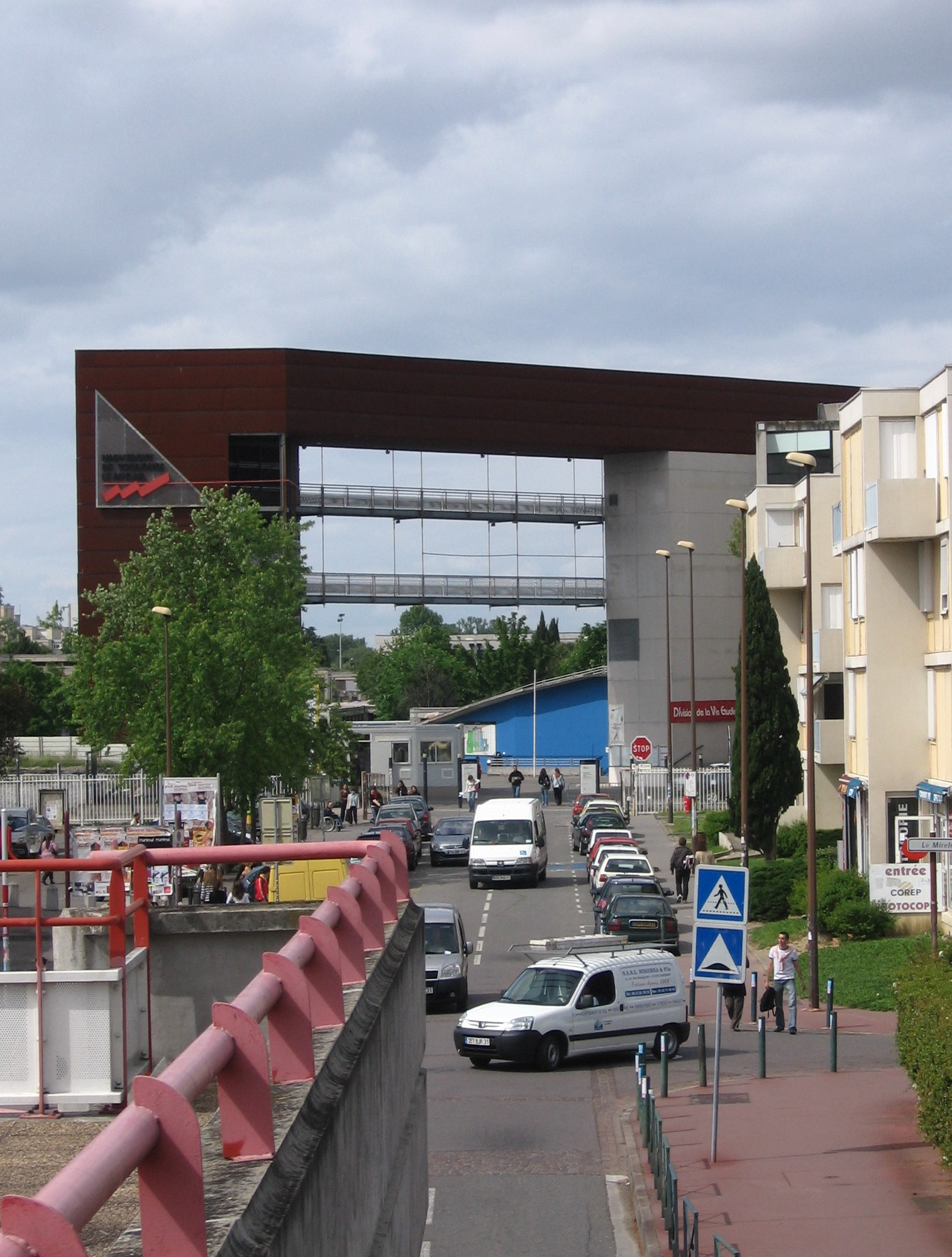 Entrée de l'université toulouse II (le mirail) - France